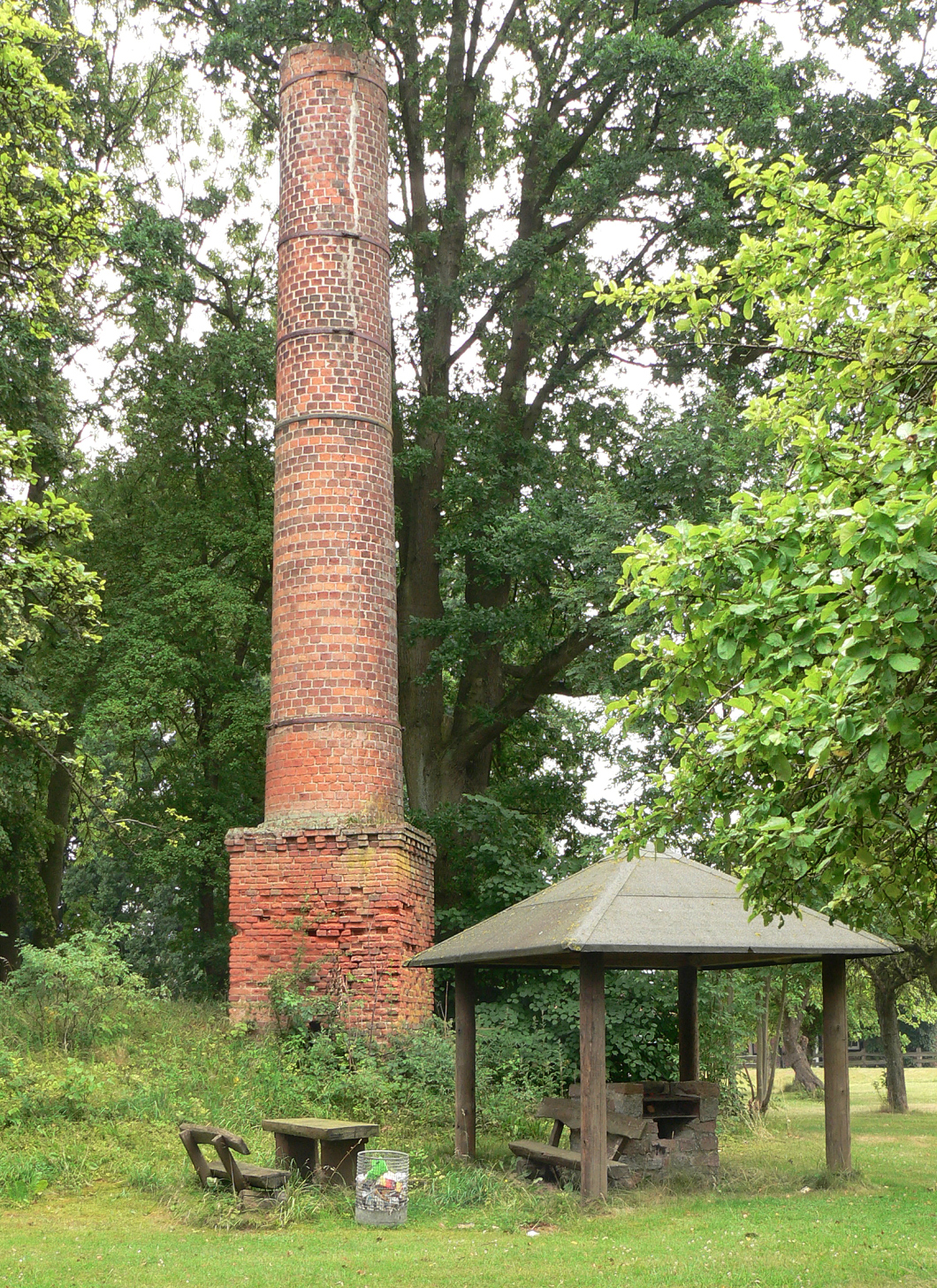 Waddeweitz